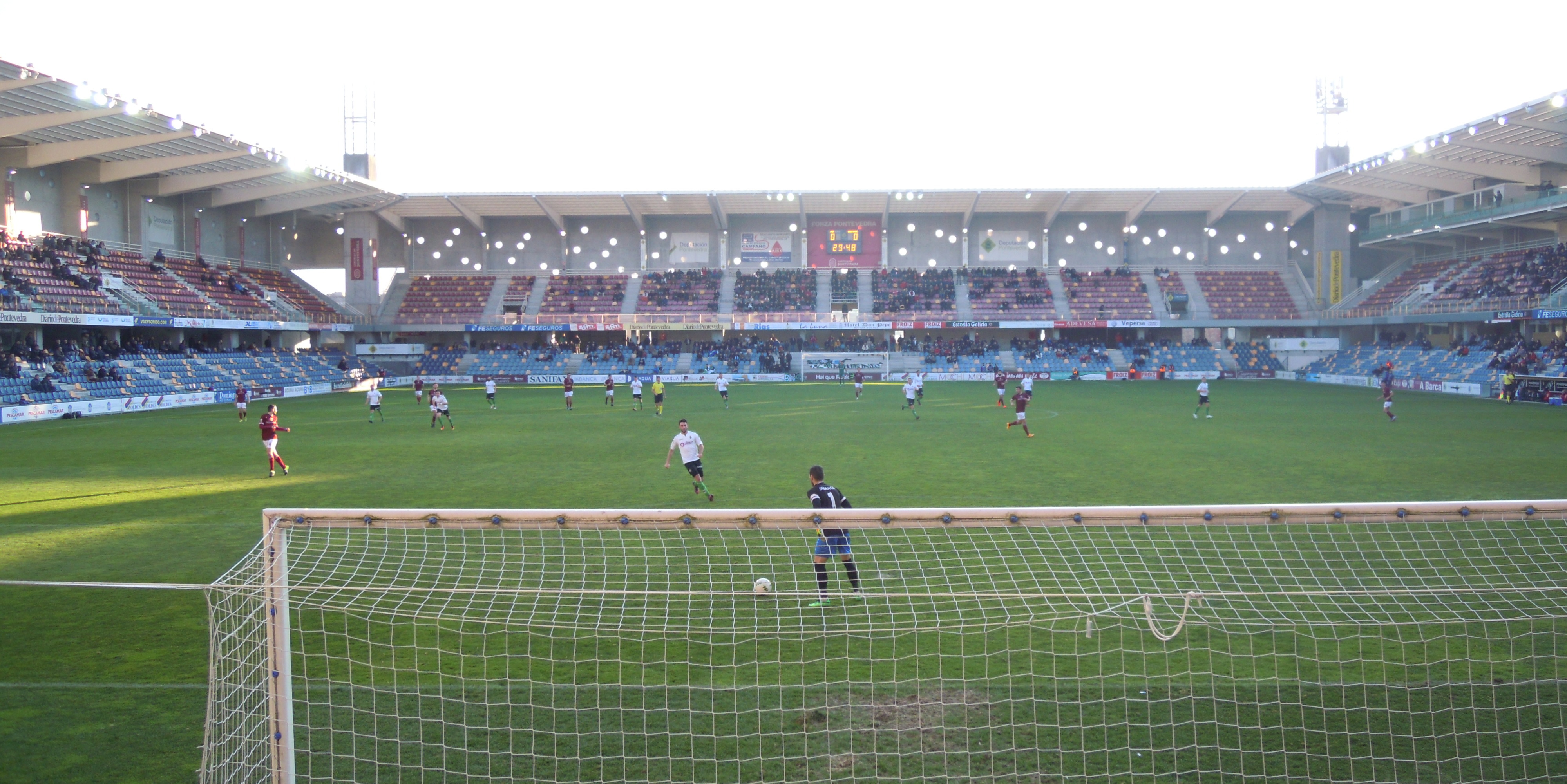 Encontro de liga da segunda división B no Estadio de Pasarón entre o Pontevedra CF e o Racing de Santander